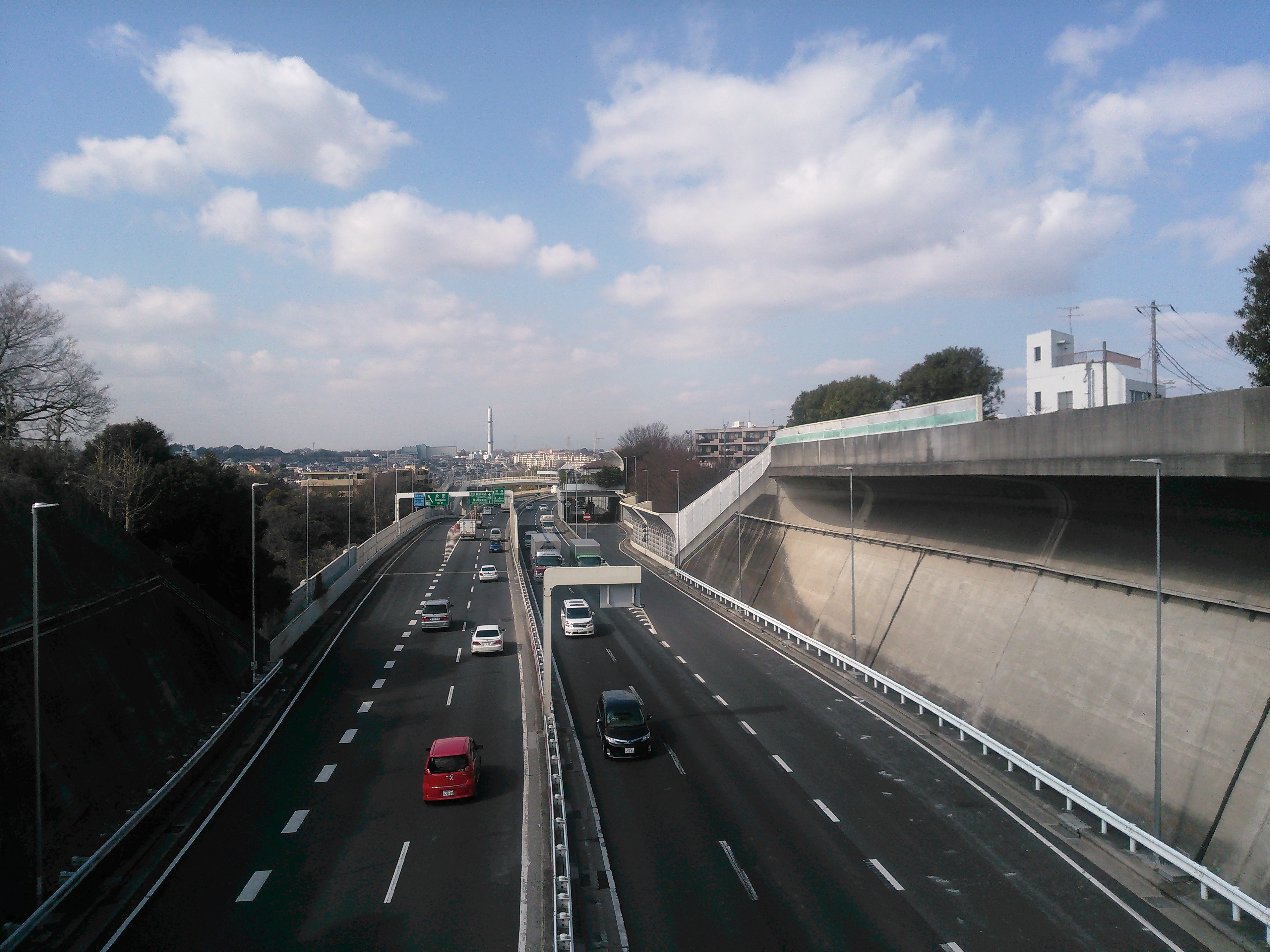 首都高狩場線、永田出口付近